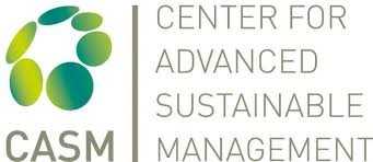 Logo CASM